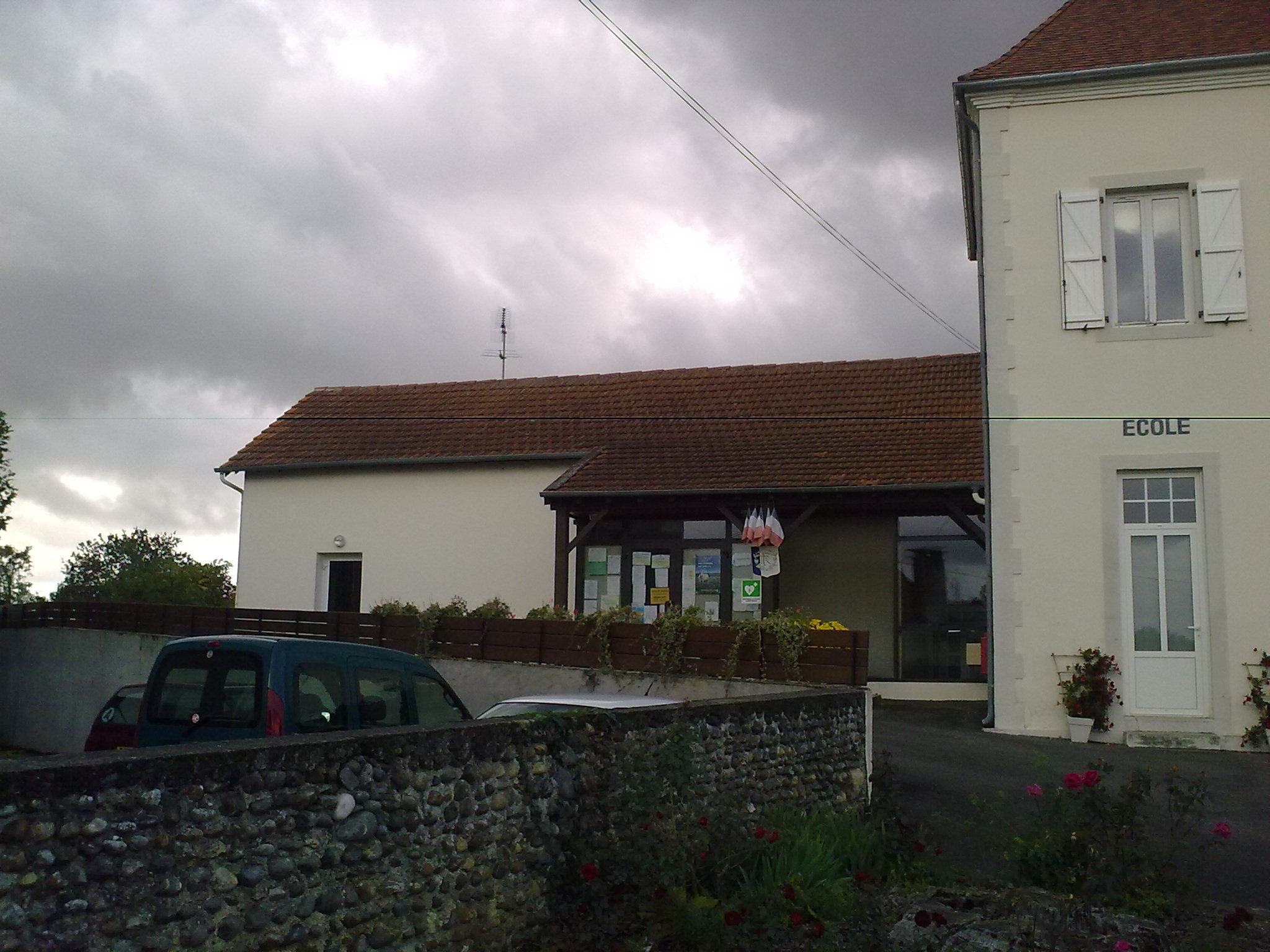 Castillon (Canton d'Arthez-de-Béarn)